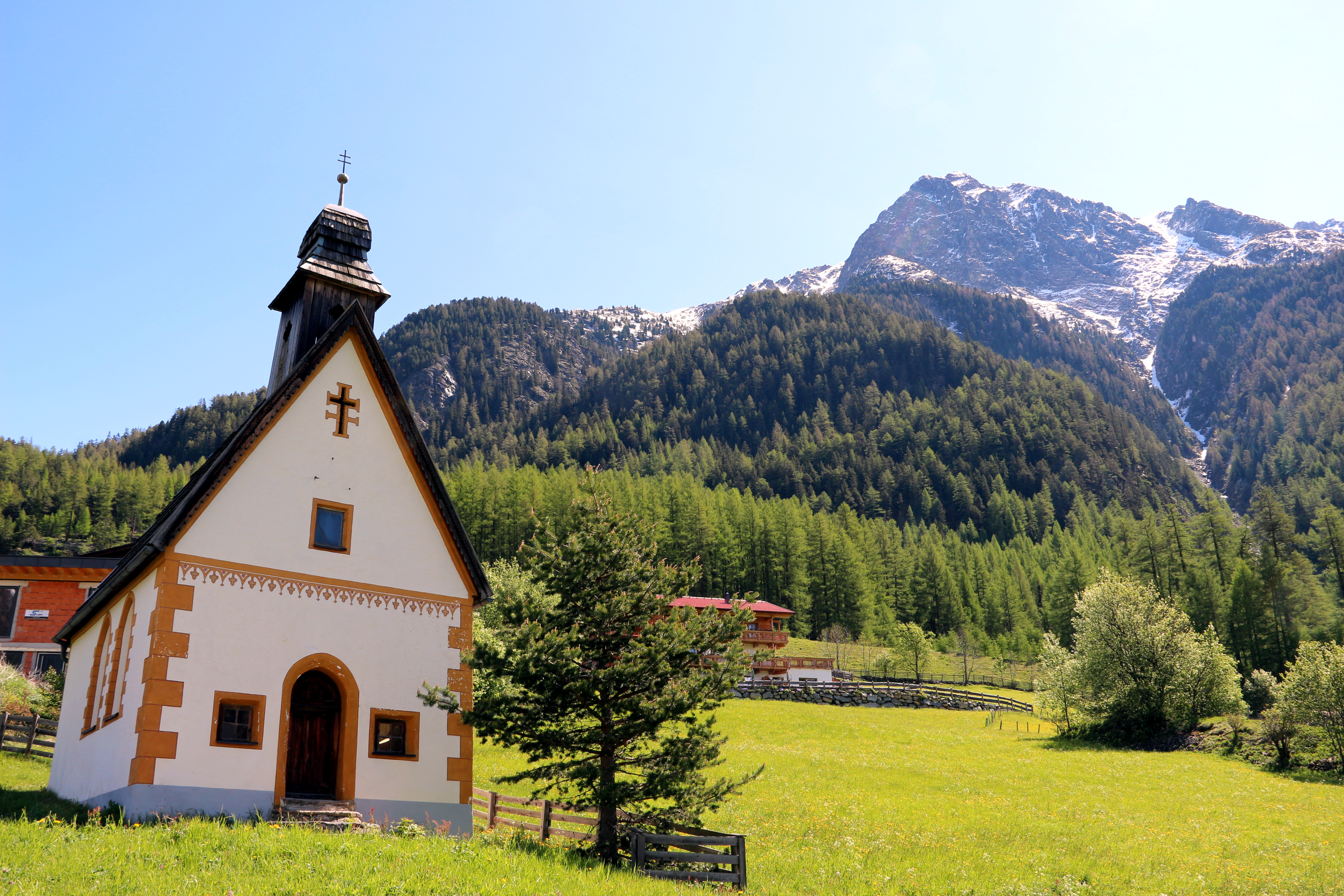 Ortskapelle Burgstein in der Gemeinde Längenfeld, Ötztal, Tirol.